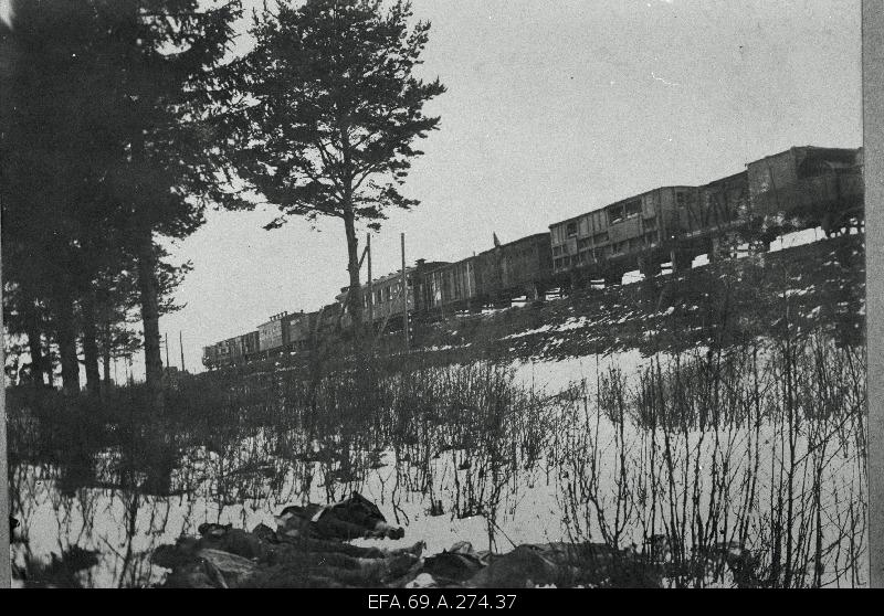 Laiarööpmeline soomusrong nr 1 Tapa vallutamisel. Rongi kõrval võsas langenud enamlased (9. jaanuar 1919)